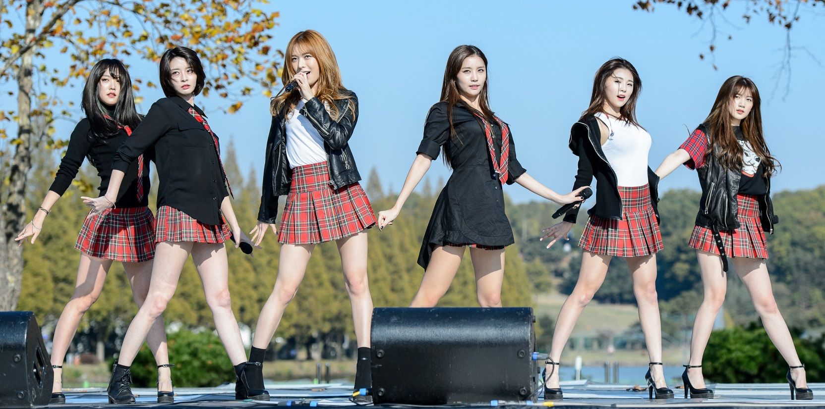 한국어 (조선): 151031 청주 힐링로드 문화축제 - 헬로비너스